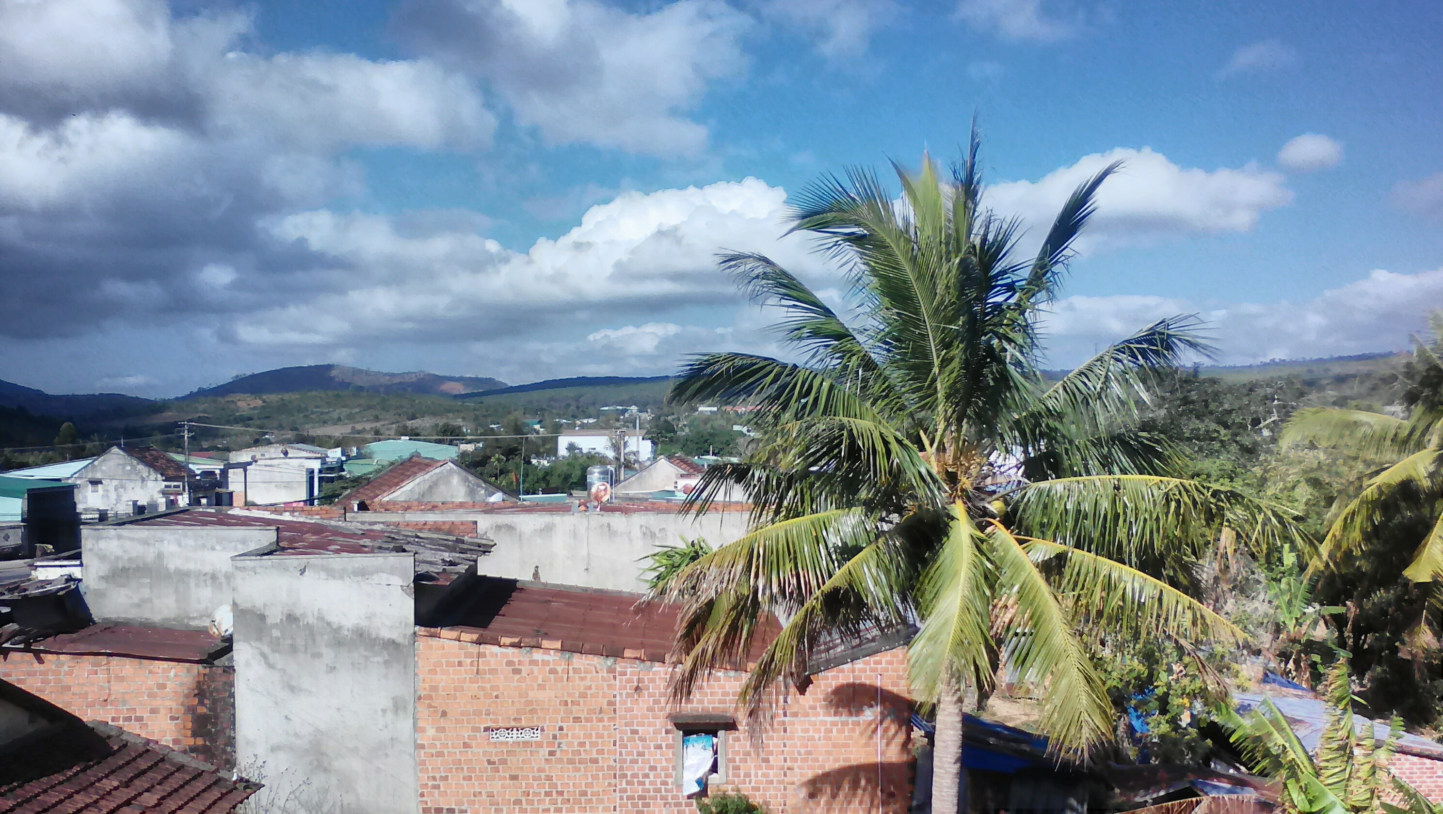 Ảnh chụp 1 góc thôn Phú Danh, xã H'ra, huyện Mang Yang, Gia Lai